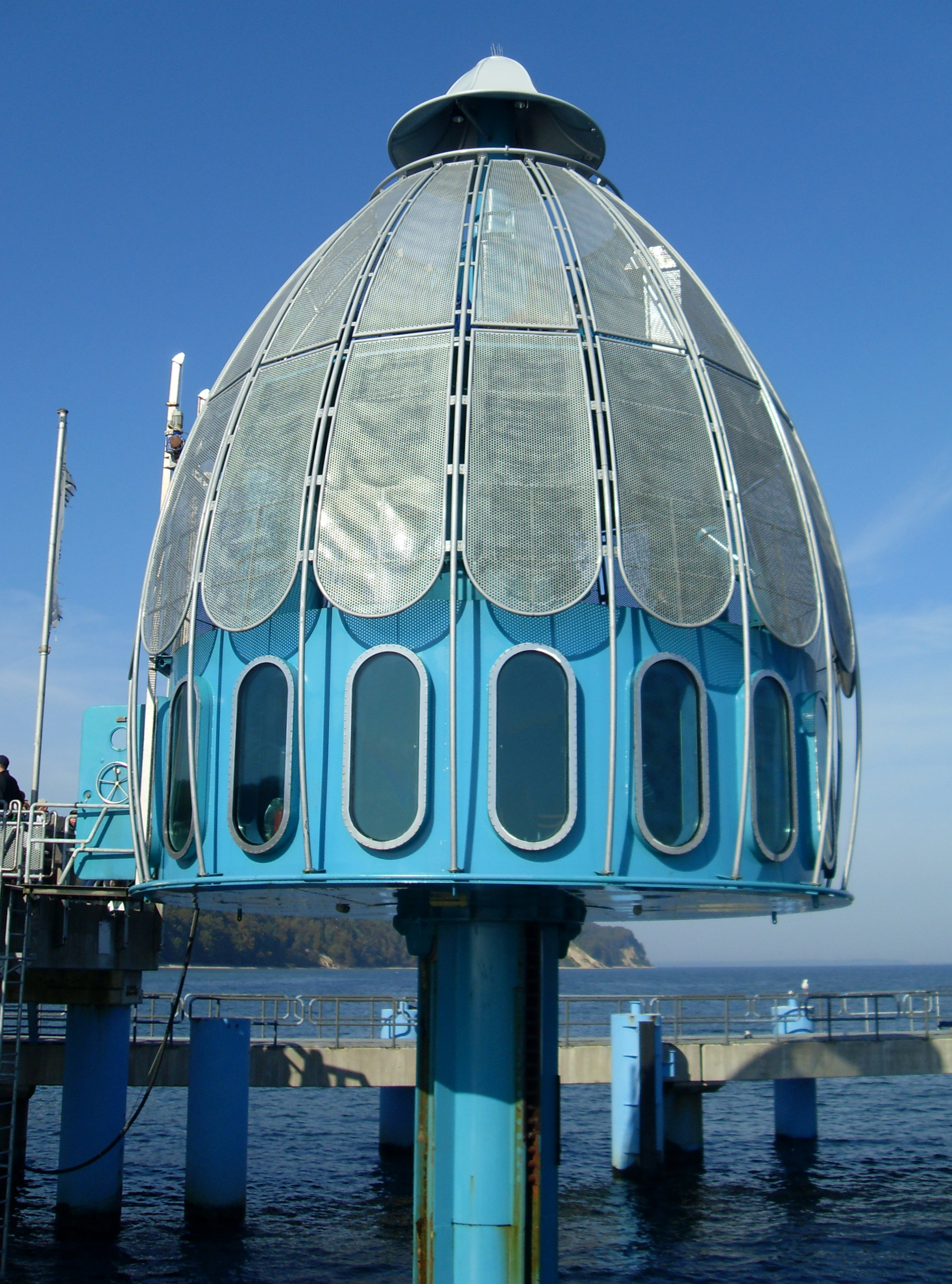 Tauchgondel am Ende der Seebrücke in Sellin